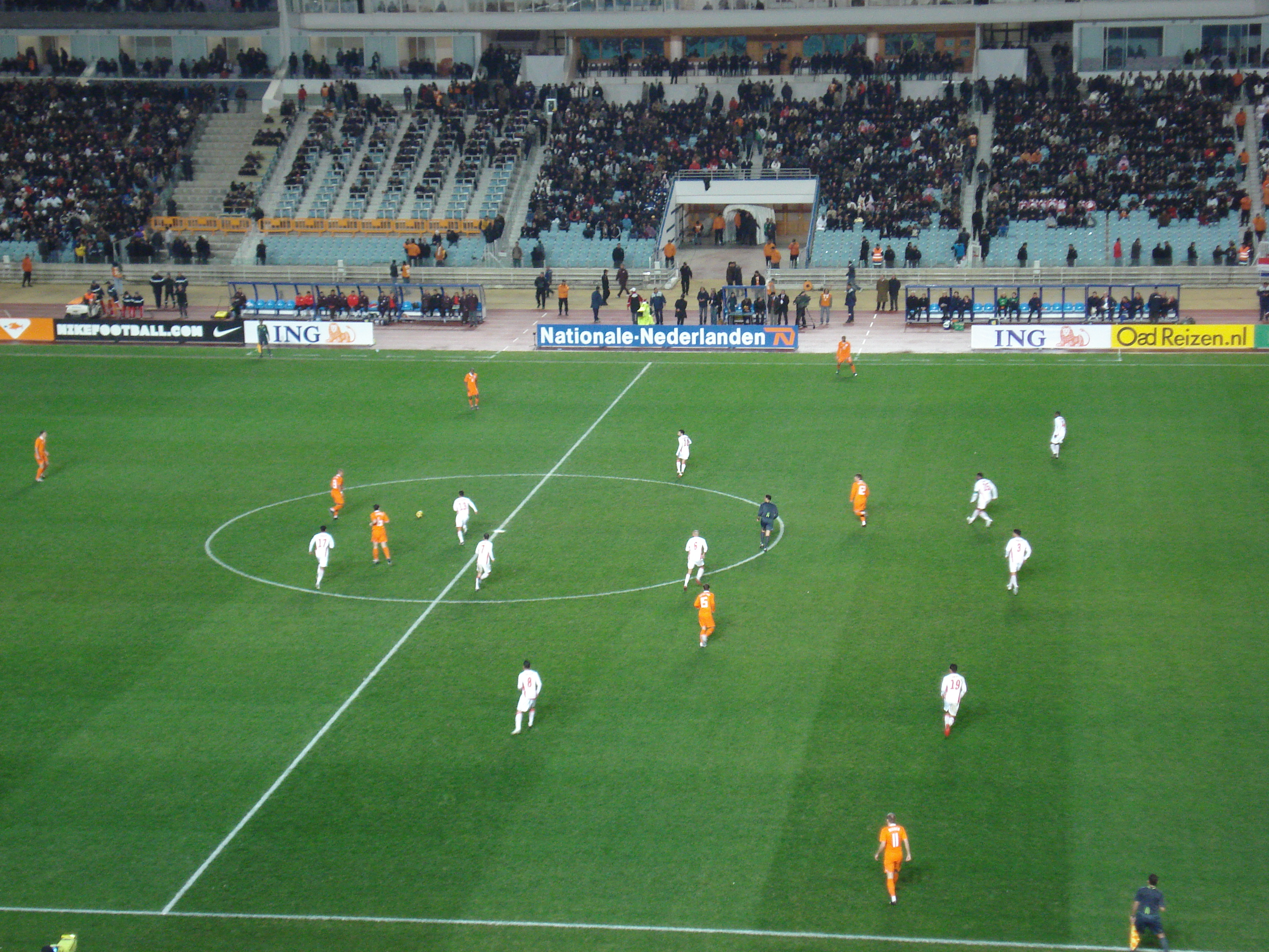 Tunisie - Pays-Bas (1-1), Stade de Radès, Tunis, Tunisie